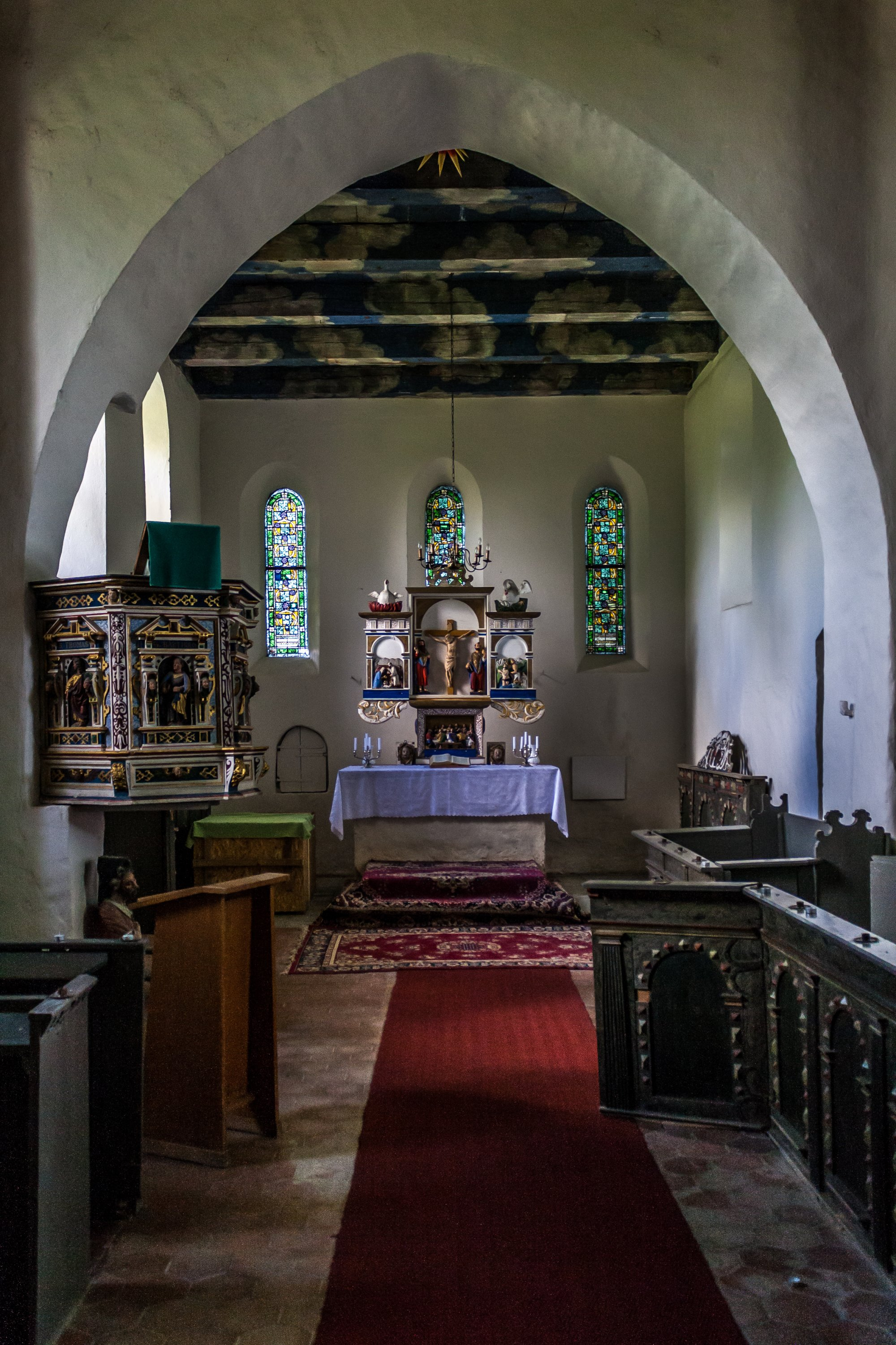 Dorfkirche Felchow Retabel